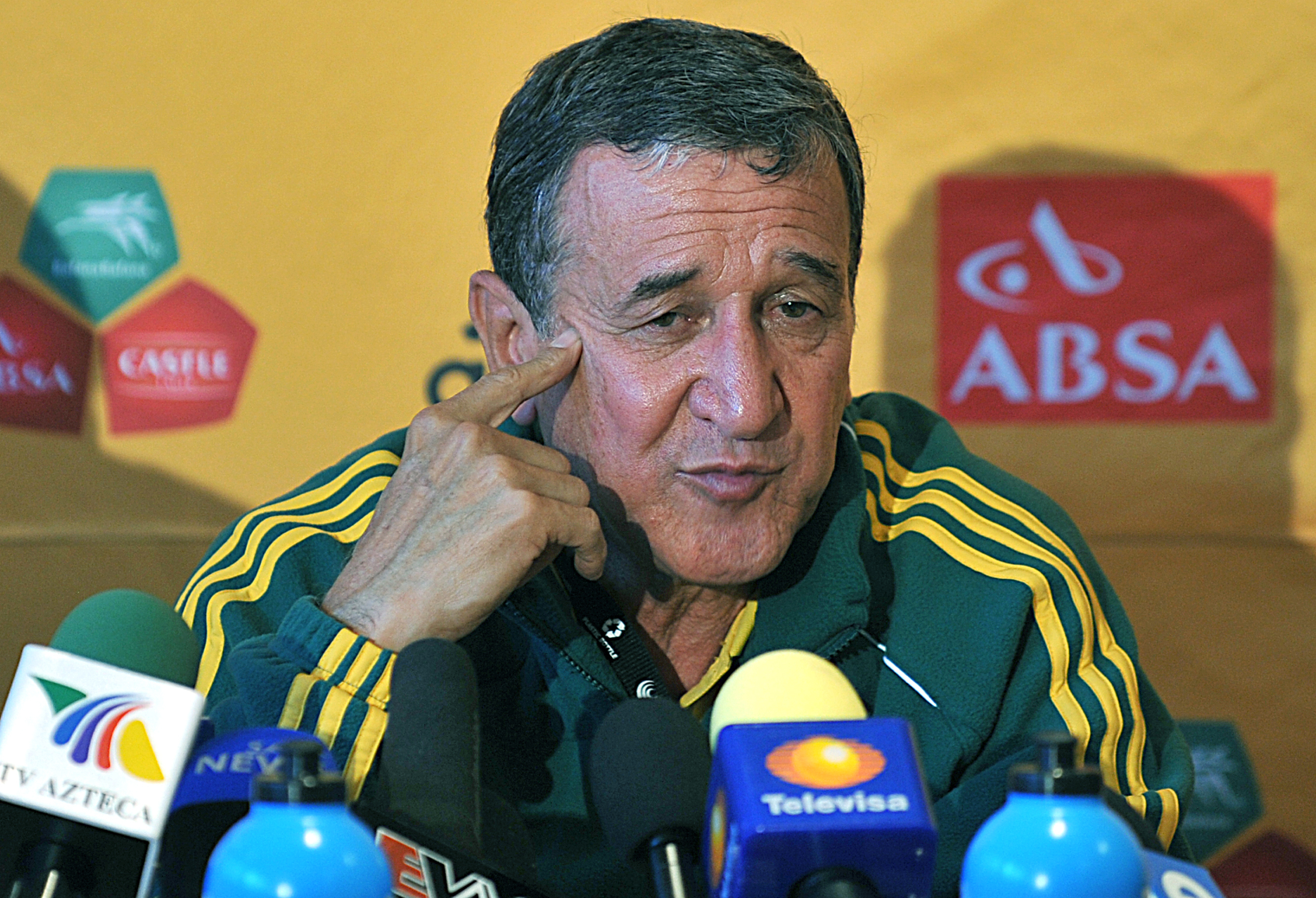 Johannesburgo (África do Sul) - O treinador da África do Sul (Bafana Bafana), o brasileiro Carlos Alberto Parreira, concede entrevista à imprensa, após treino da seleção na Universidade de Witwatersand.